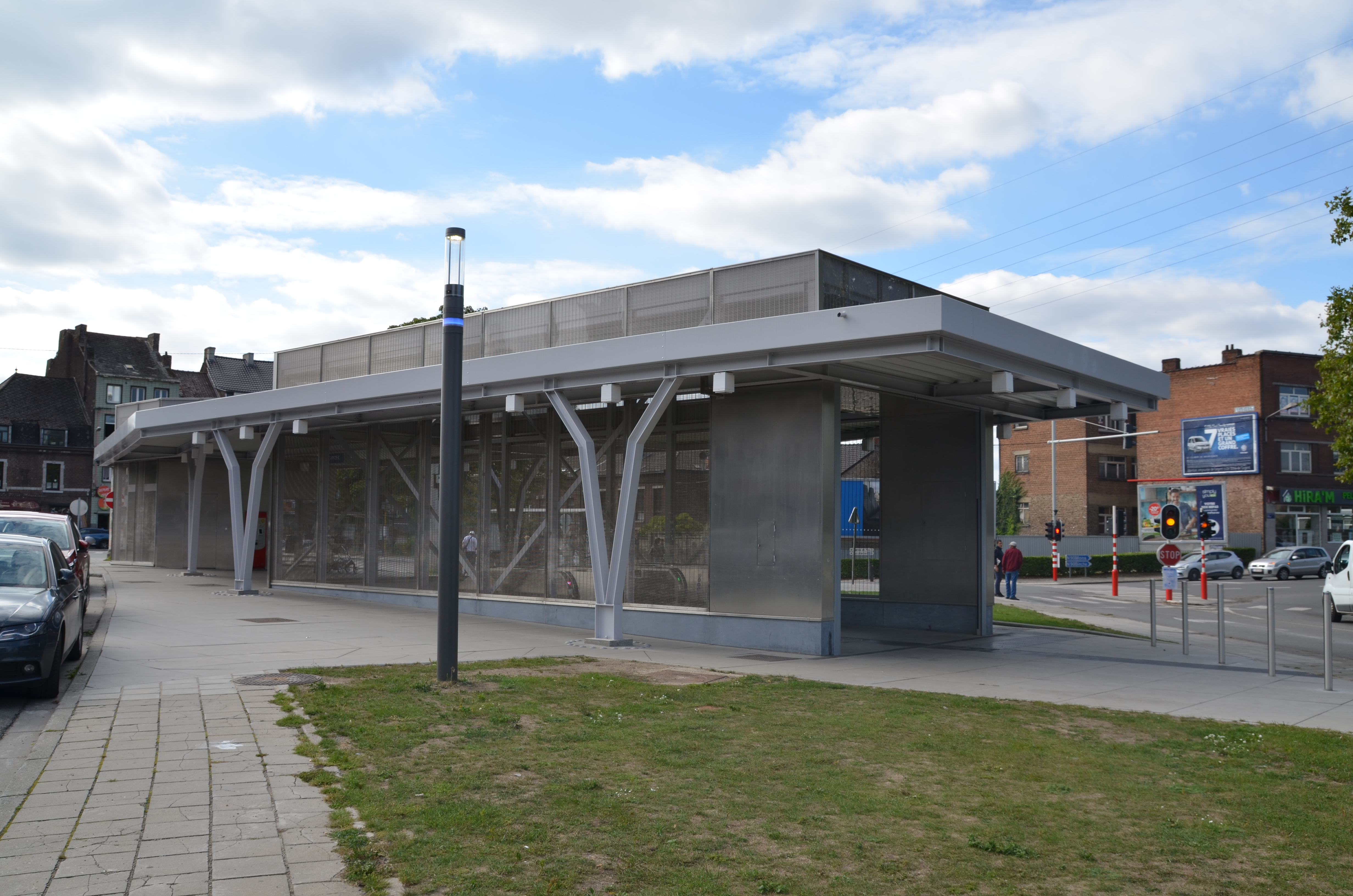 De Cartier (métro de Charleroi) - aménagement de 2019.